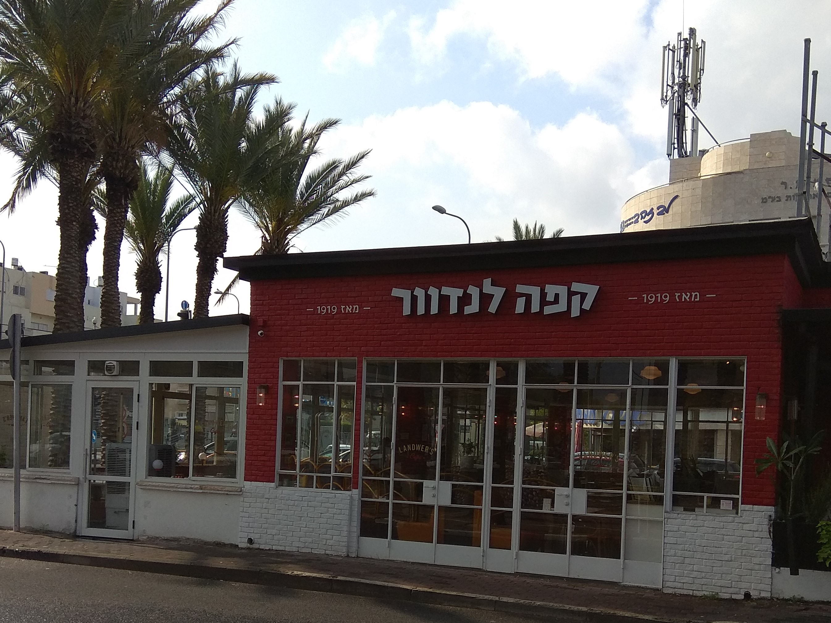 קפה לנדוור, סניף קריית מוצקין